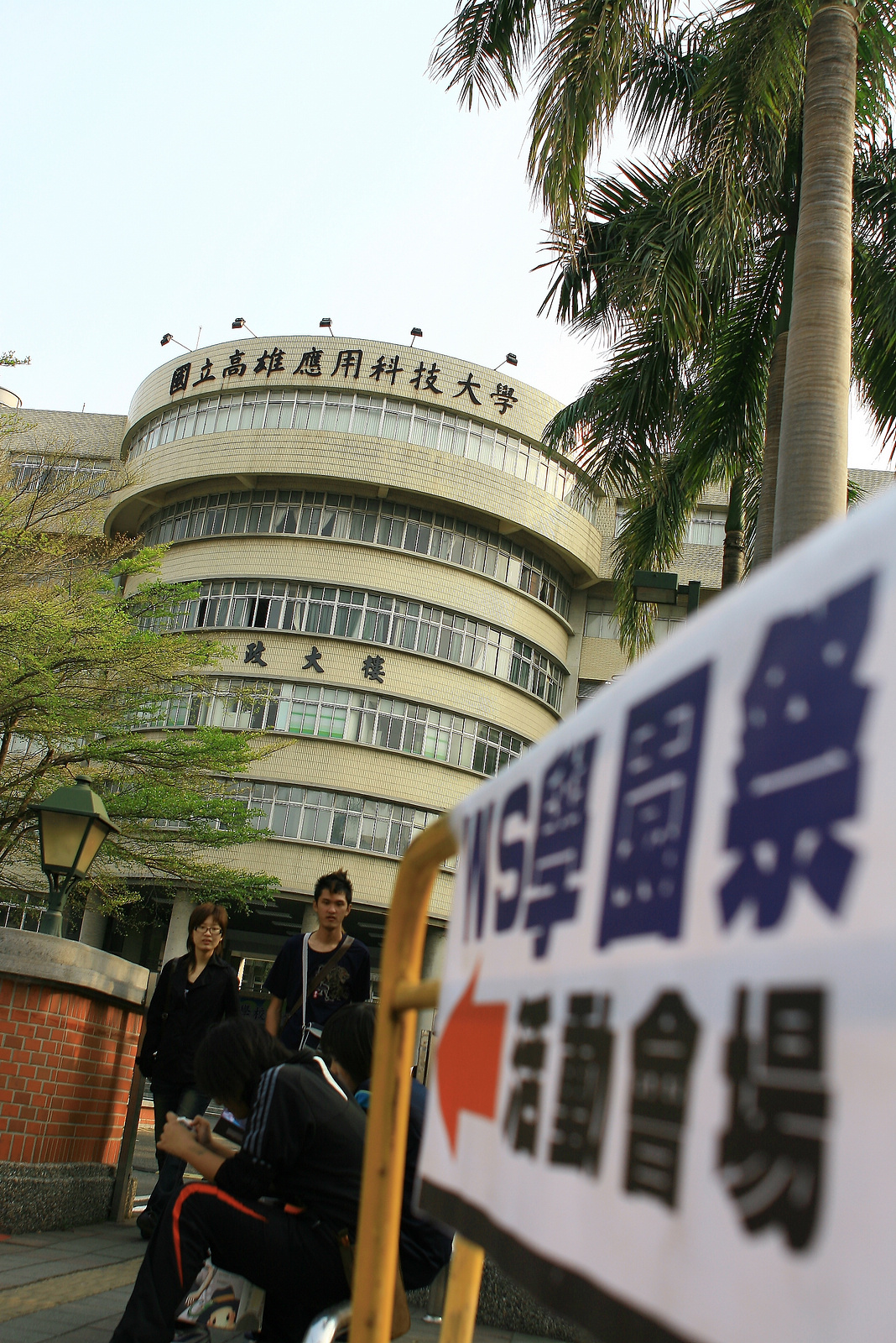 國立高雄應用科技大學行政大樓前，第9屆WS學園祭動漫遊戲同人創作展會場方向指示牌。